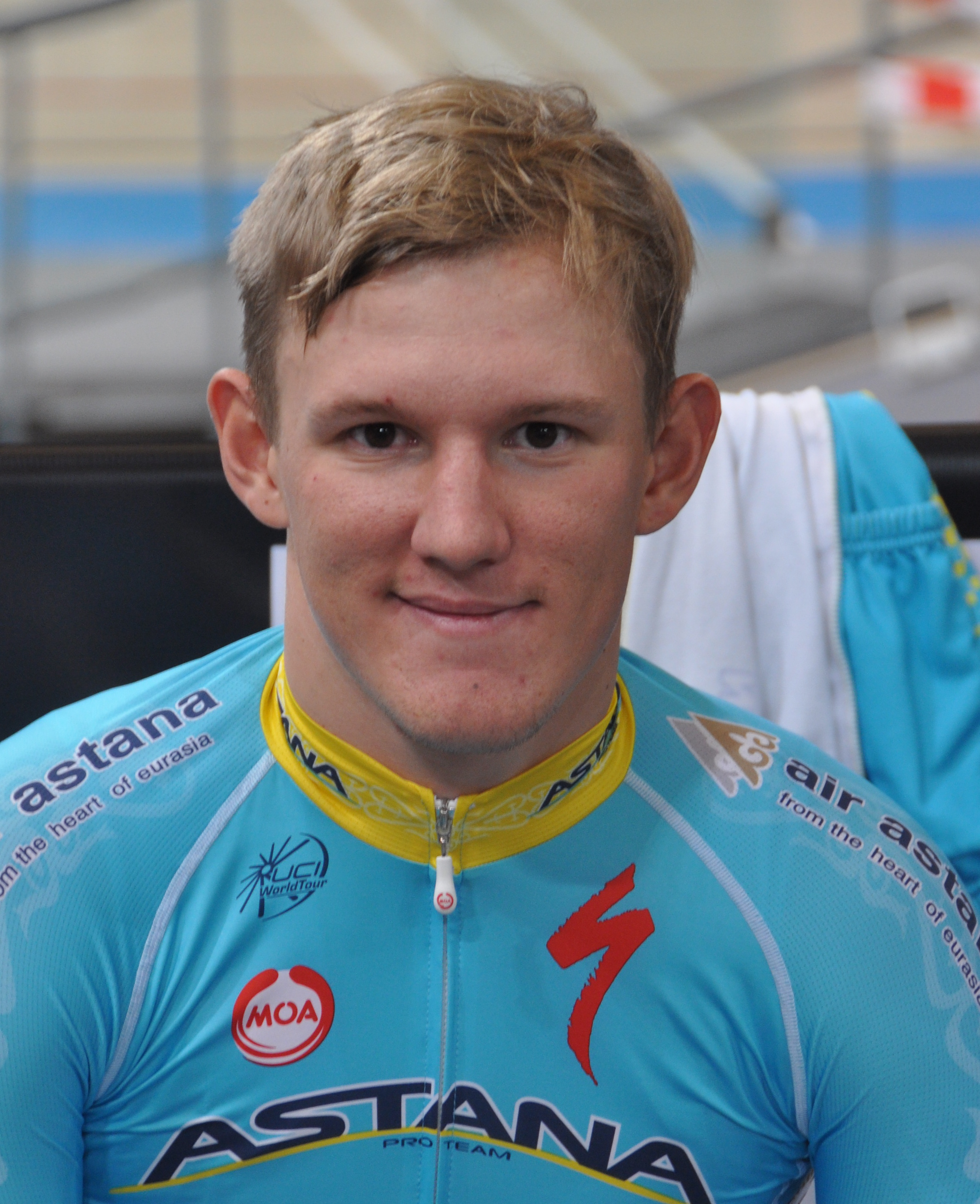 Robert Gaineyev, Radsportler aus Kasachstan